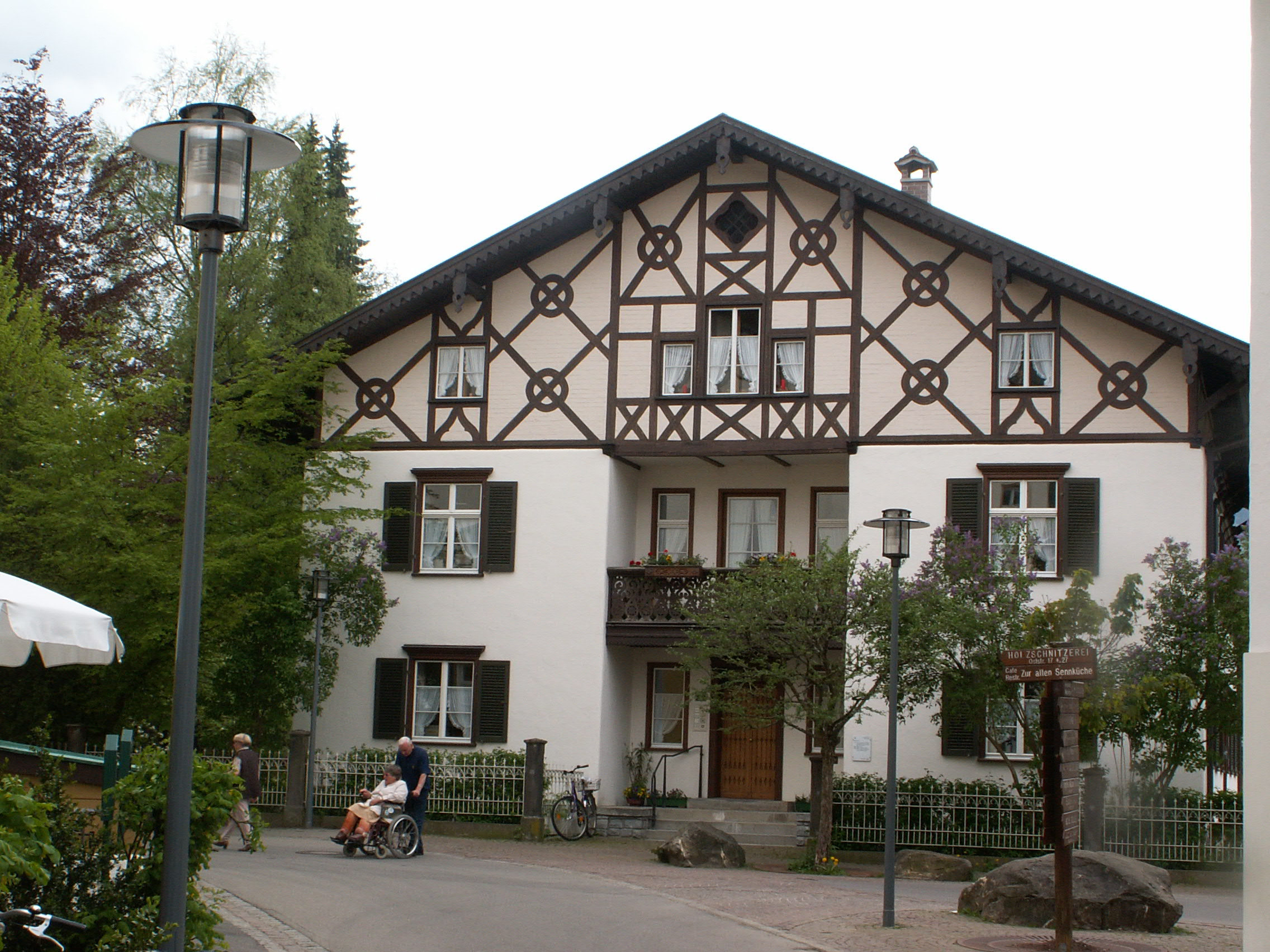 Ehem. Pfarrhaus in Oberstdorf